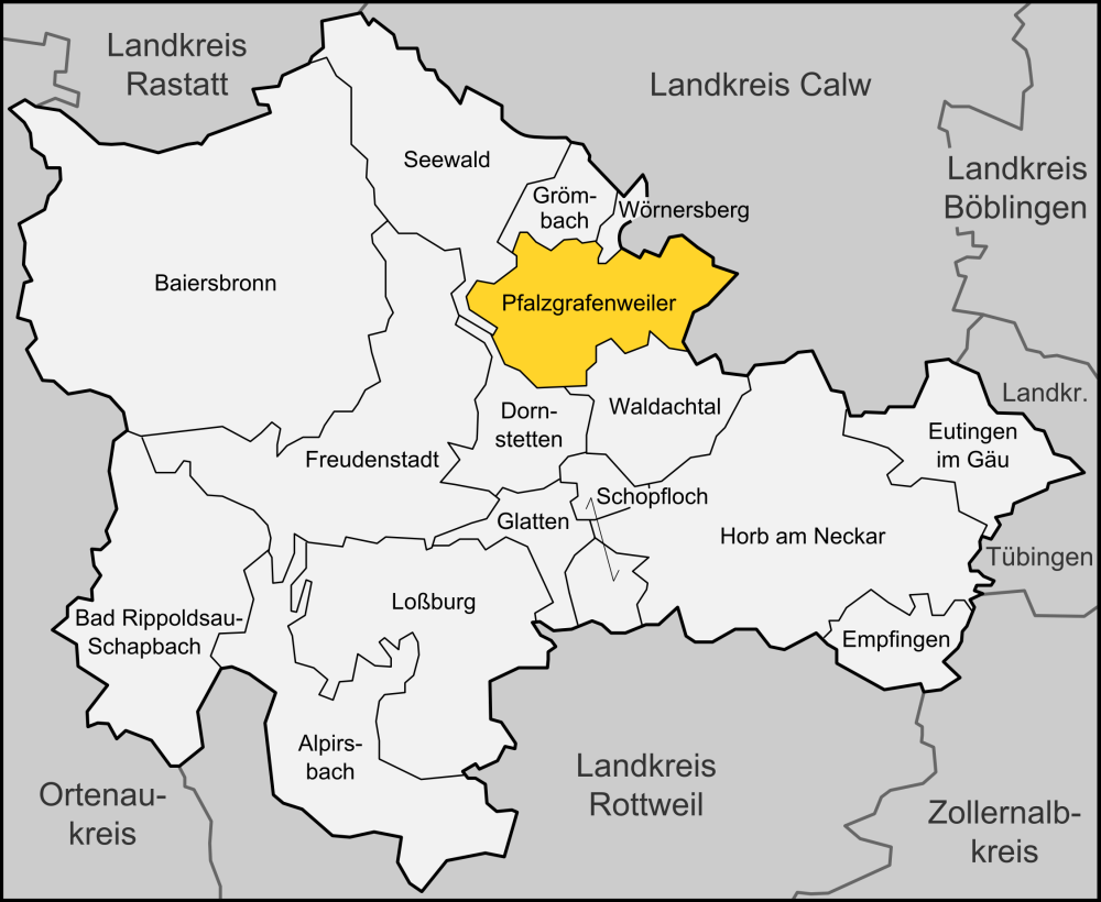 Karte der Gemeinde Pfalzgrafenweiler im Landkreises Freudenstadt